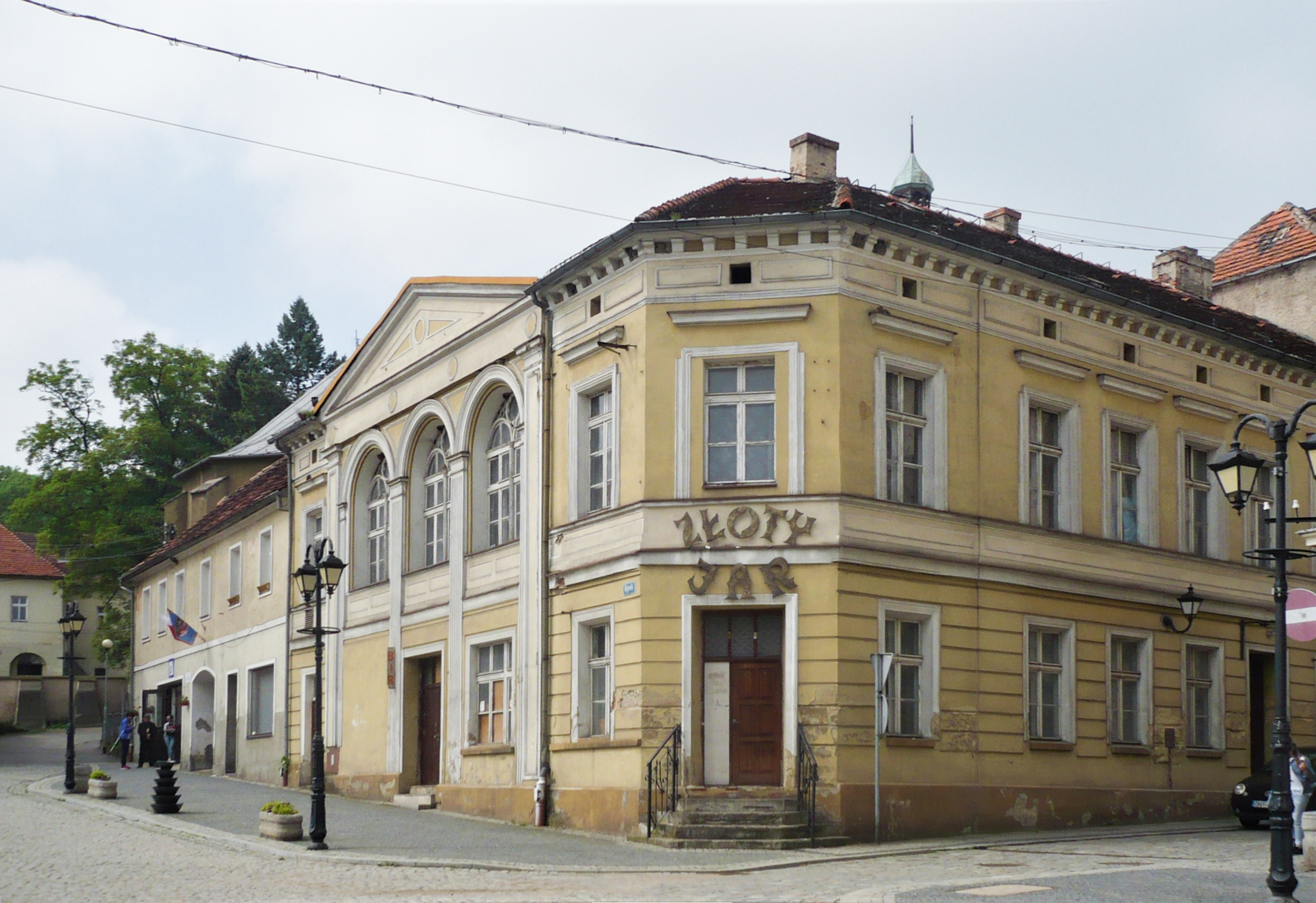 Złoty Stok